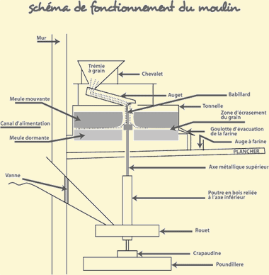 Shéma type d'un moulin à eau désignant les différents élément intervenant dans le processus d'entraînement du moulin par l'eau permettant l'écrasement du grain et la production de farine.